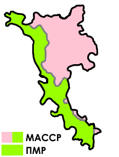 Соотношение территорий МАССР и ПМР (за исклюением территорий ПМР на правом берегу Днестра; также не указаны территории на левобережье, контролируемые Молдавией)